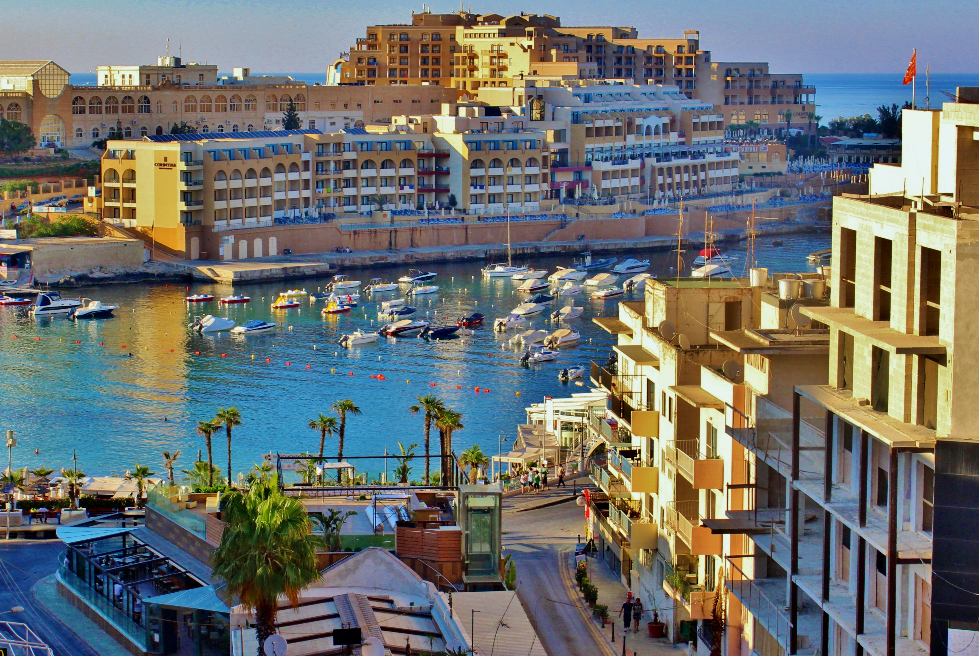 St. Julians Bay Malta